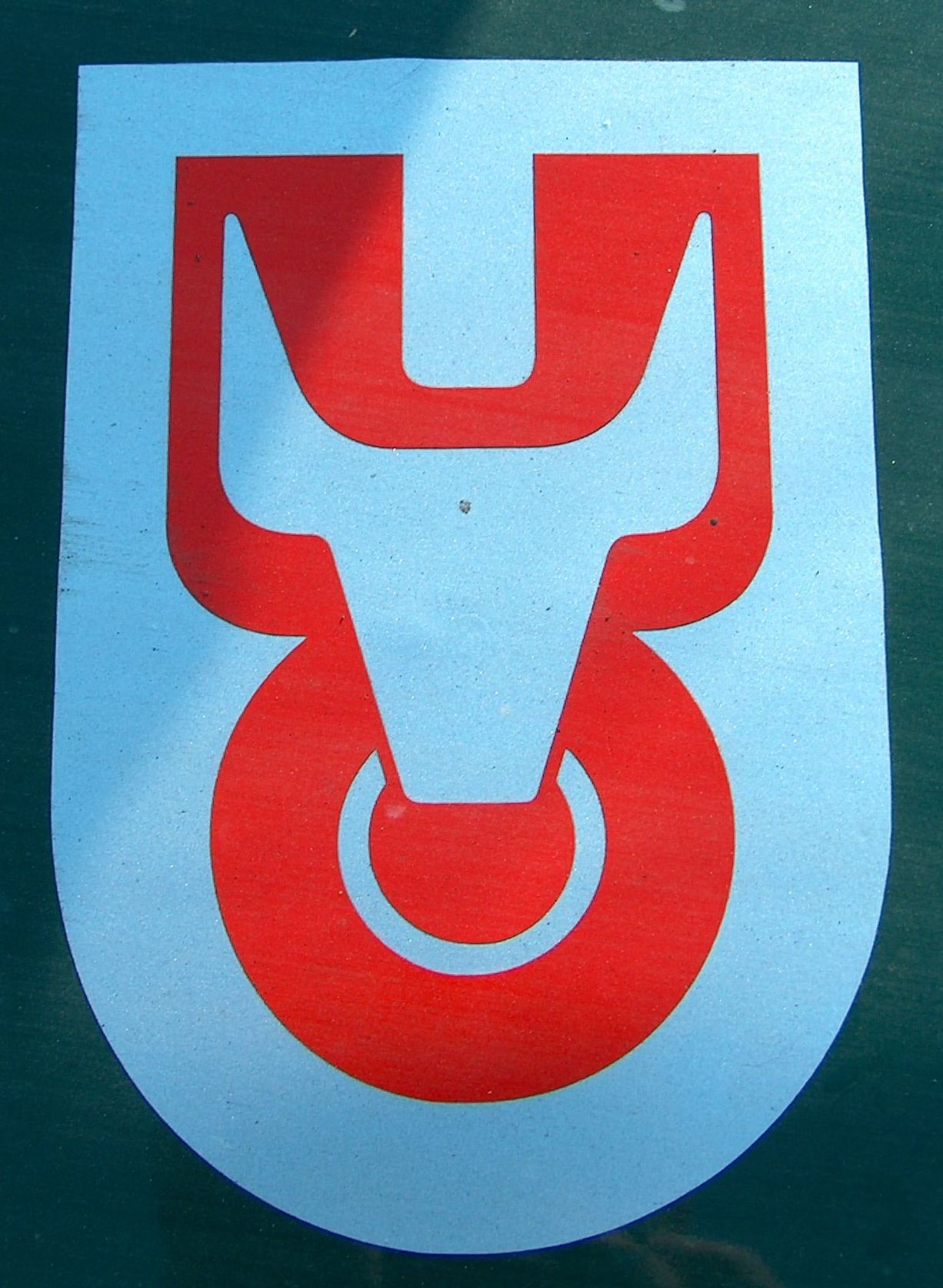 Ursprüngliches Unimog-Logo